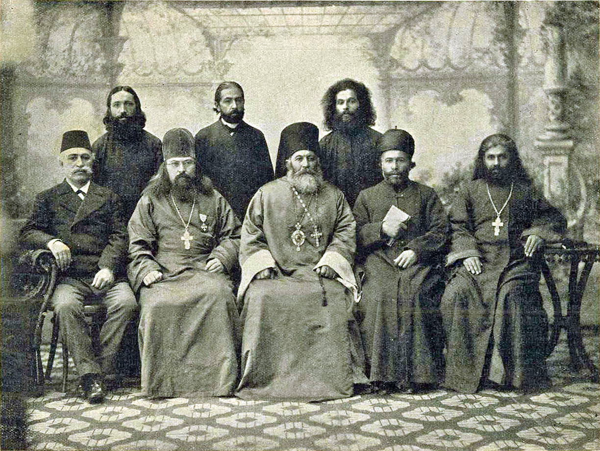 Присоединение сиро-халдейских несториан к православной церкви. Главнейшие деятели. Стоят: священник Георгий Беджианов диакон Яков Бабаханов священник Сергий Сидят: хан Юсуф Арсениос протоиерей Виктор Синадский Епископ Иона Архимандрит Илия священник Давид Вениаминов